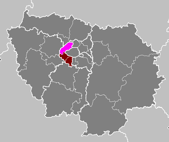 Maps of arrondissements and cantons of France: Département des Hauts-de-Seine - Arrondissement de Nanterre.PNG (Région Île-de-France)